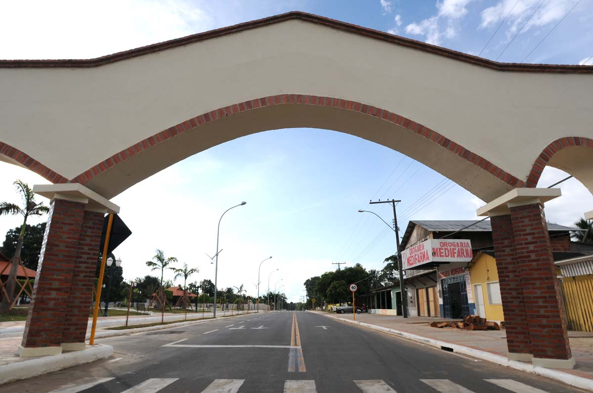 Av.Japiim - Mancio lima - Acre